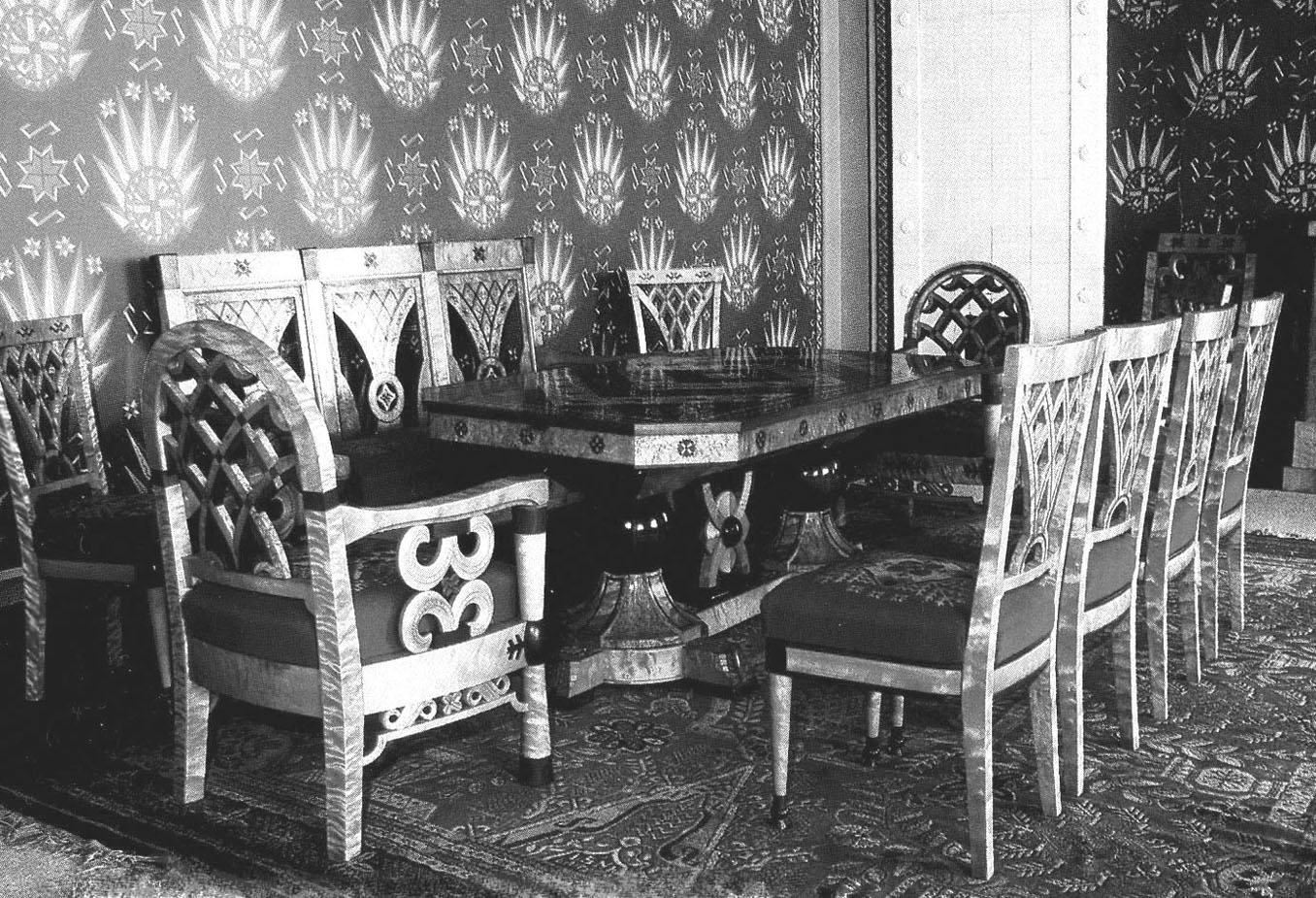 Латвия, Рига, Рижский замок, интерьер зала аккредитации послов. Автор проекта интерьера и мебели художник Ансис Цирулис (1927). Фотография из собрания В. Турчанинова.